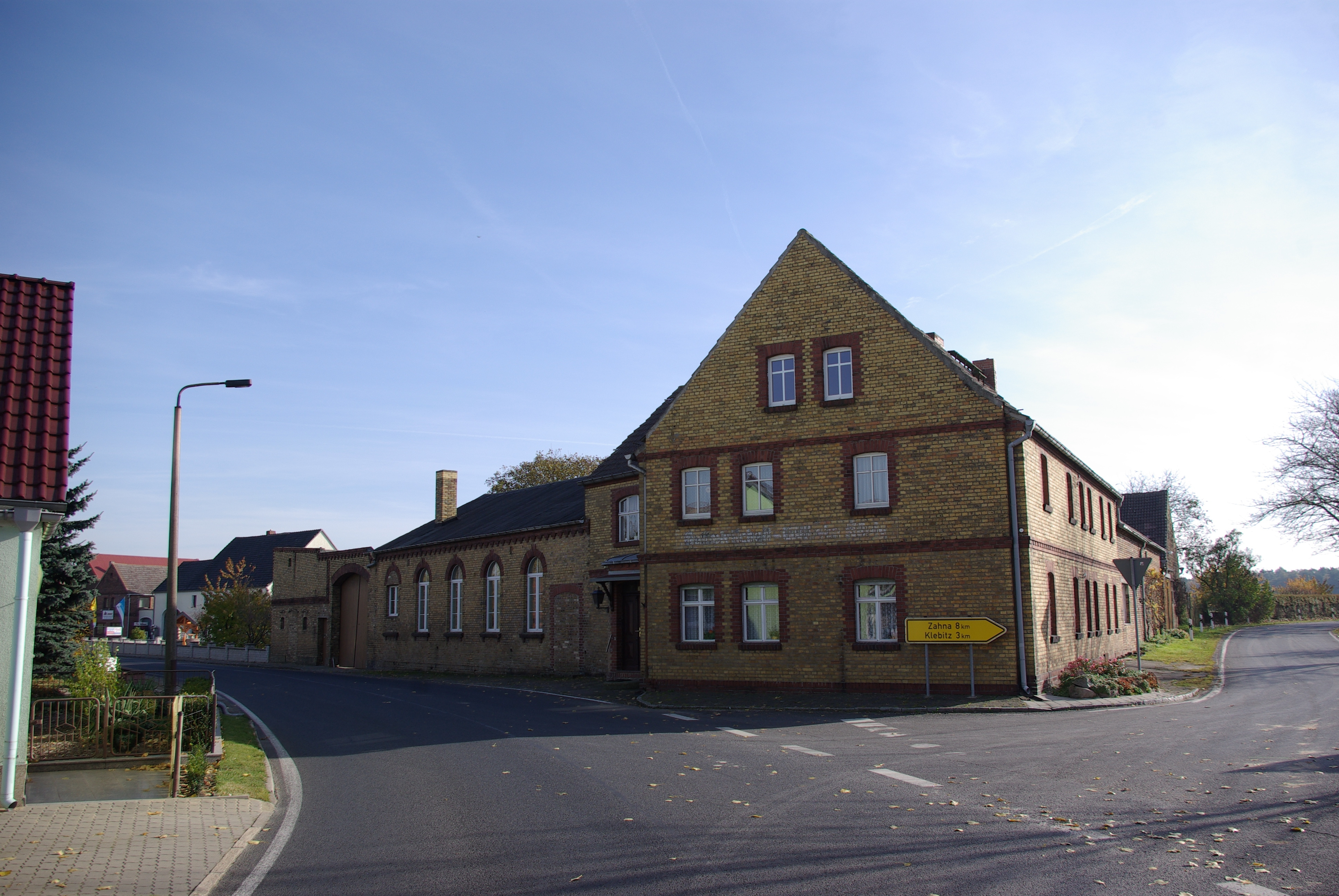 Niedergörsdorf, Ortsteil Kurzlipsdorf in Brandenburg. Das Haus ist die ehemalige Gaststätte König mit einem Saalanbau. Das Haus steht unter Denkmalschutz.